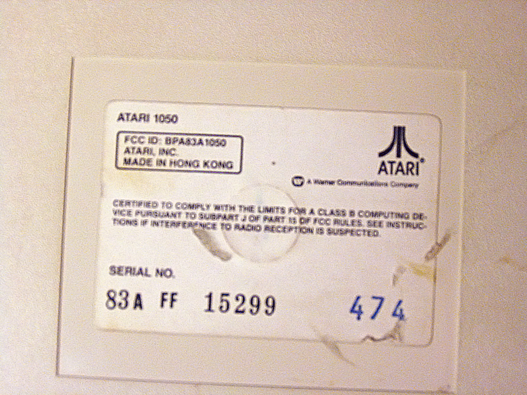 Atari 1050 - наклейка